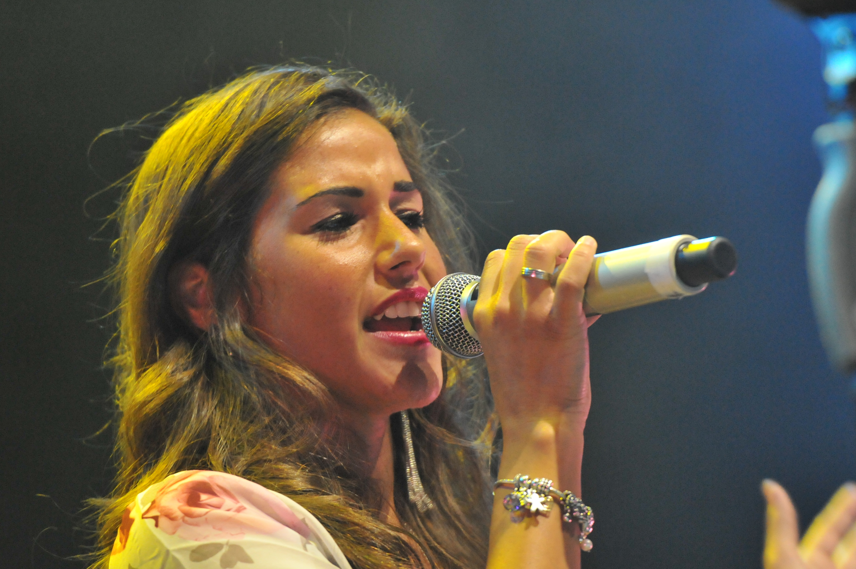 DSDS - Live on Tour. 27. Juli 2014, Stadthalle Wien.